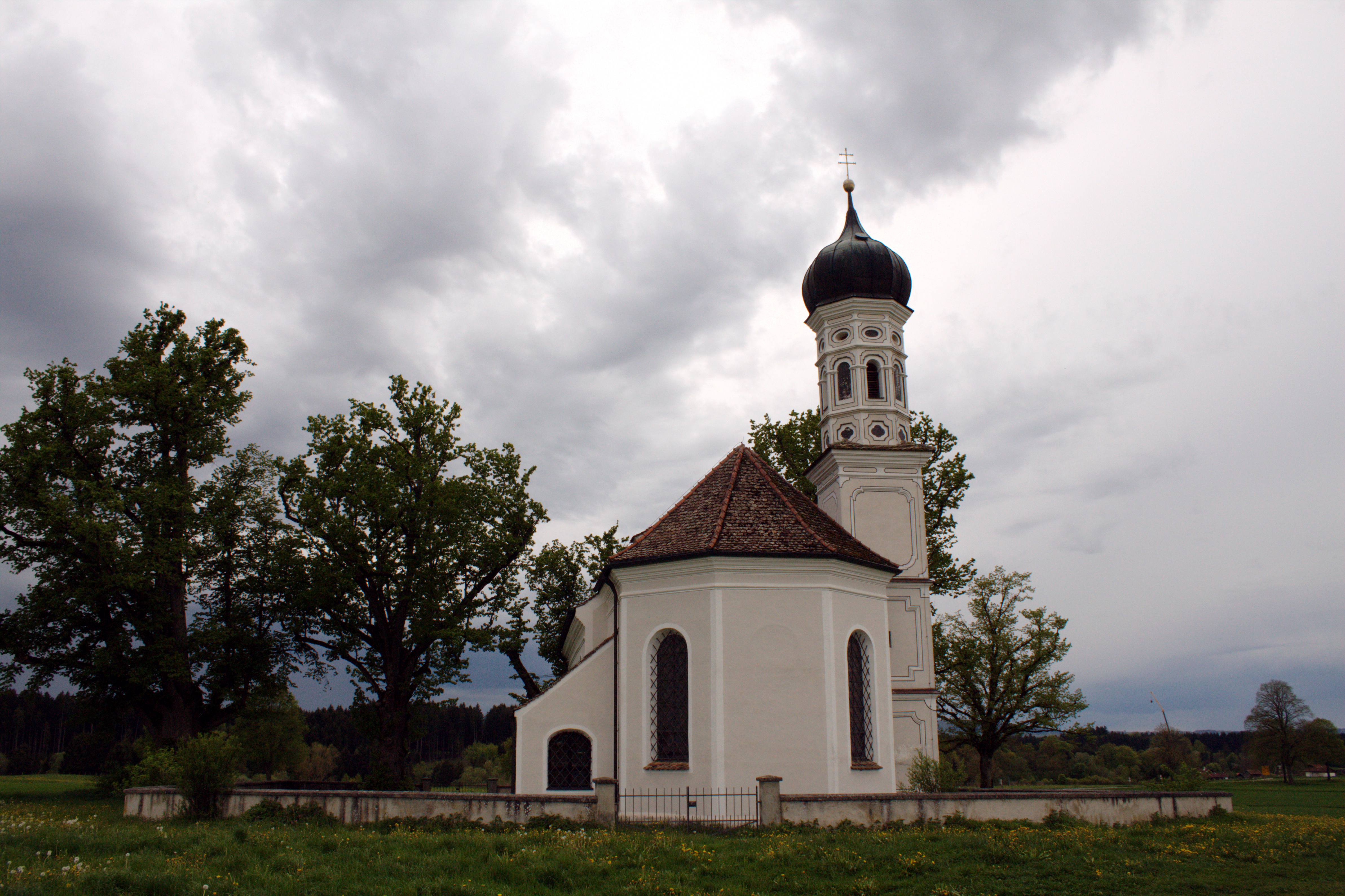 Kirche St. Andreas bei Etting, Landkreis Weilheim-Schongau, Oberbayern